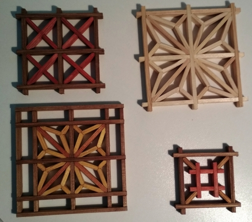 Деякі елементи декоративних решіток куміко-дзайку